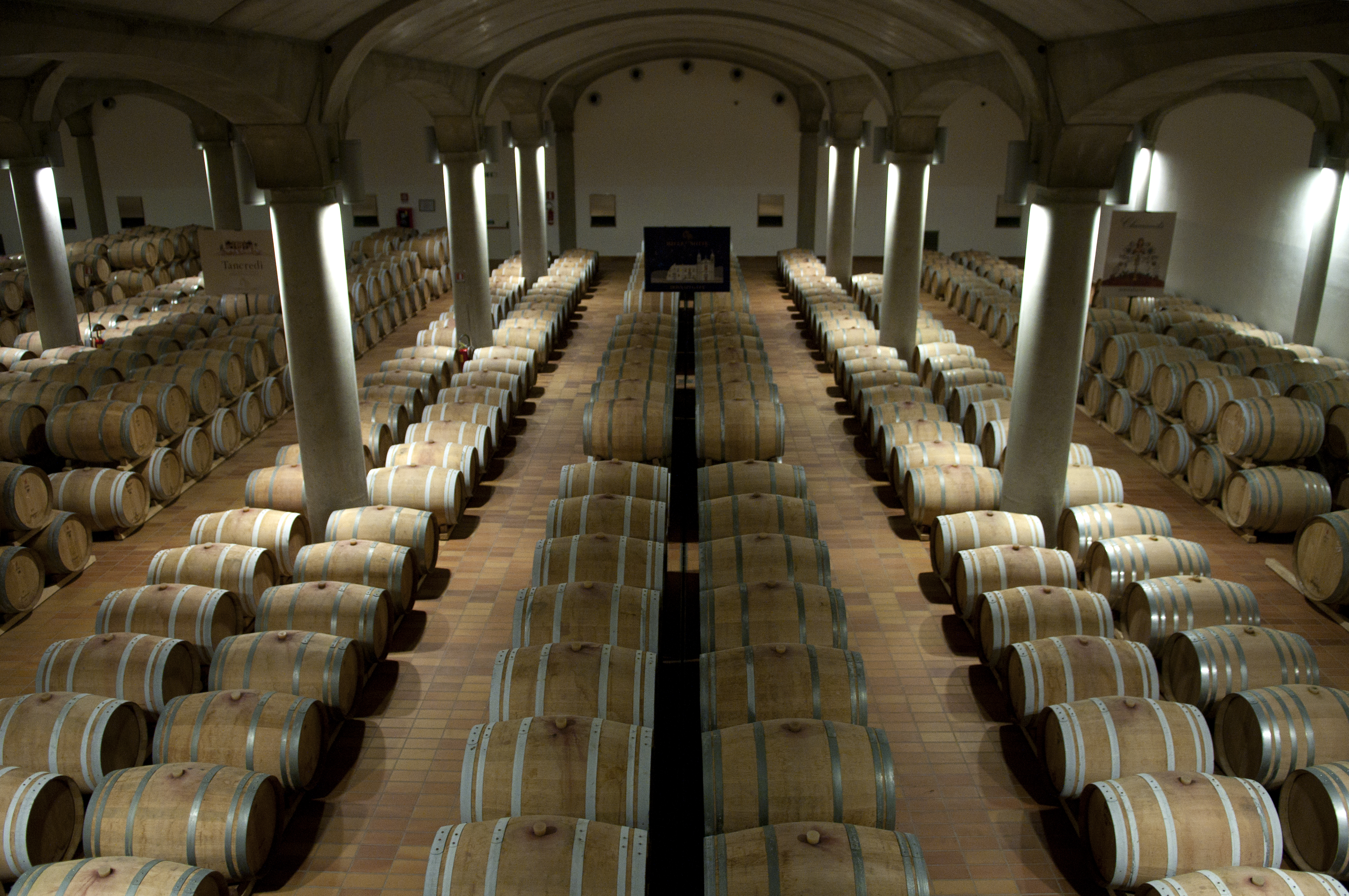 Donnafugata winery